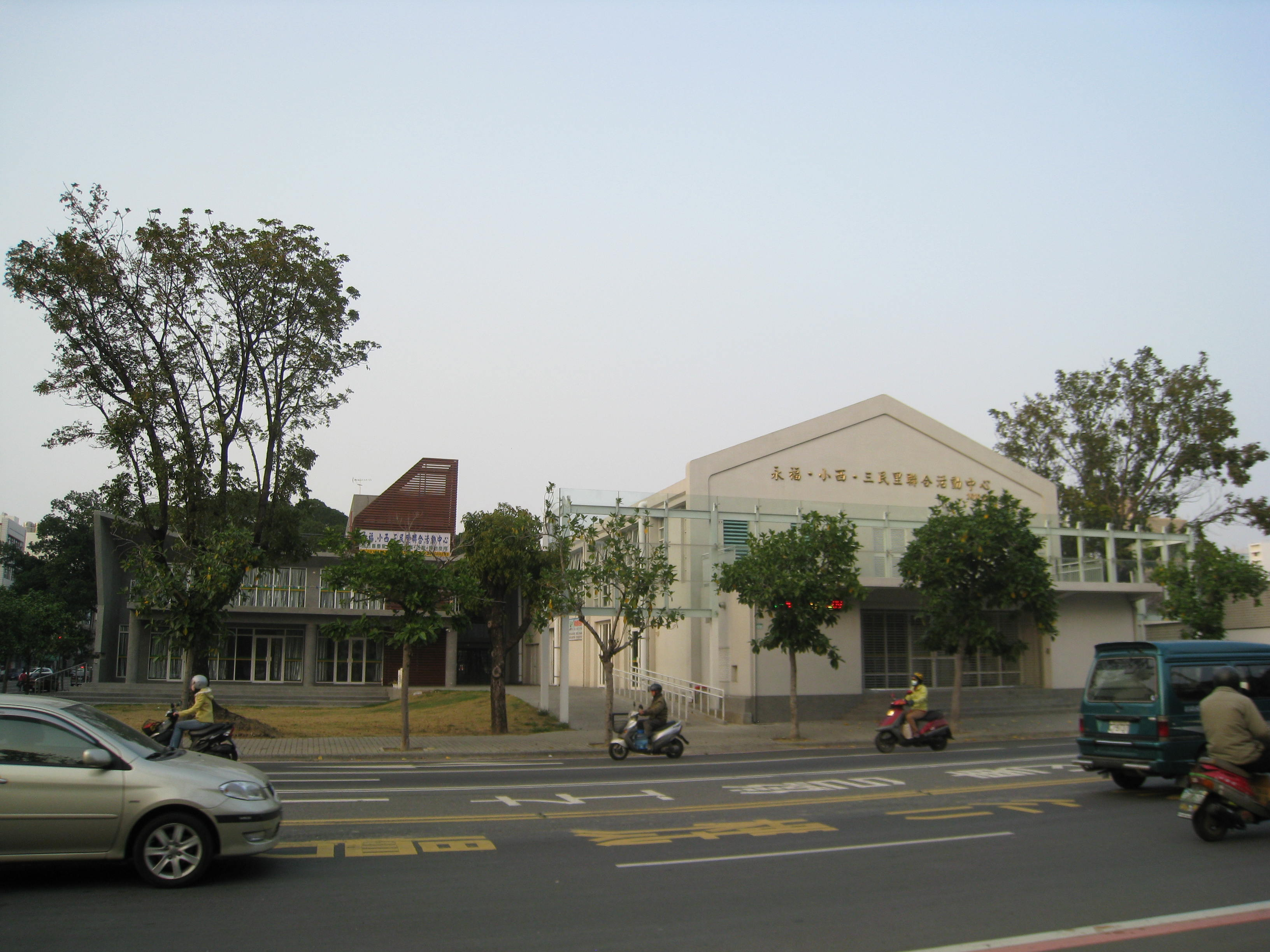 日本1895年北白川宮親王病逝於台南，其逝世之地被尊稱為御遺跡所,現為台南市中西區永福、小西、三民里共同聯合活動中心 ，東側公園為原來台南神社(內苑)範圍